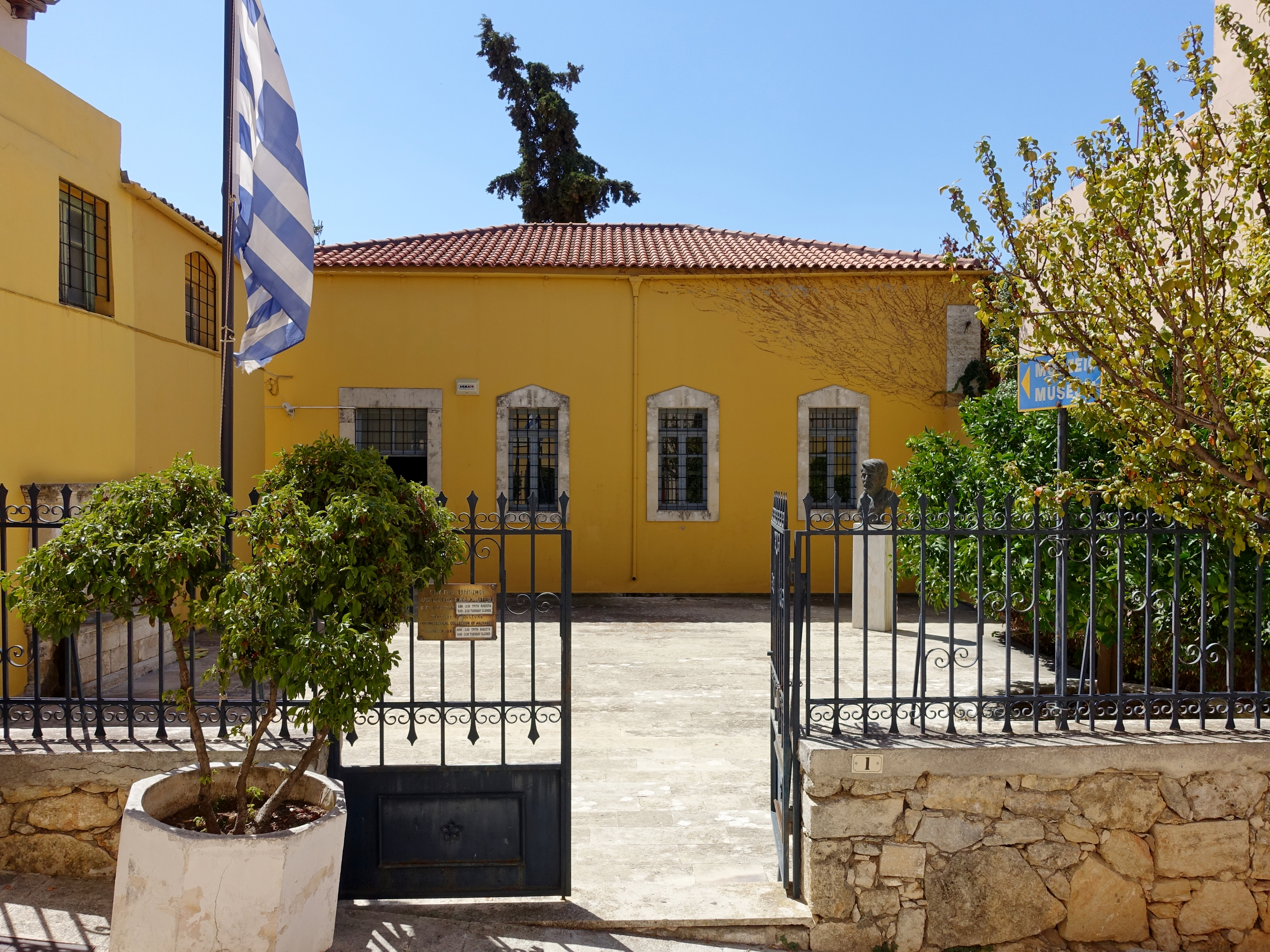 Archäologisches Museum Archanes, Kreta, Griechenland